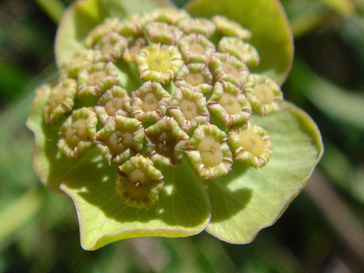 Bupleurum angulosum close-up